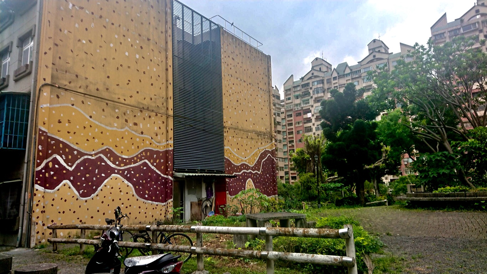 中文（台灣）: 安康平宅一角